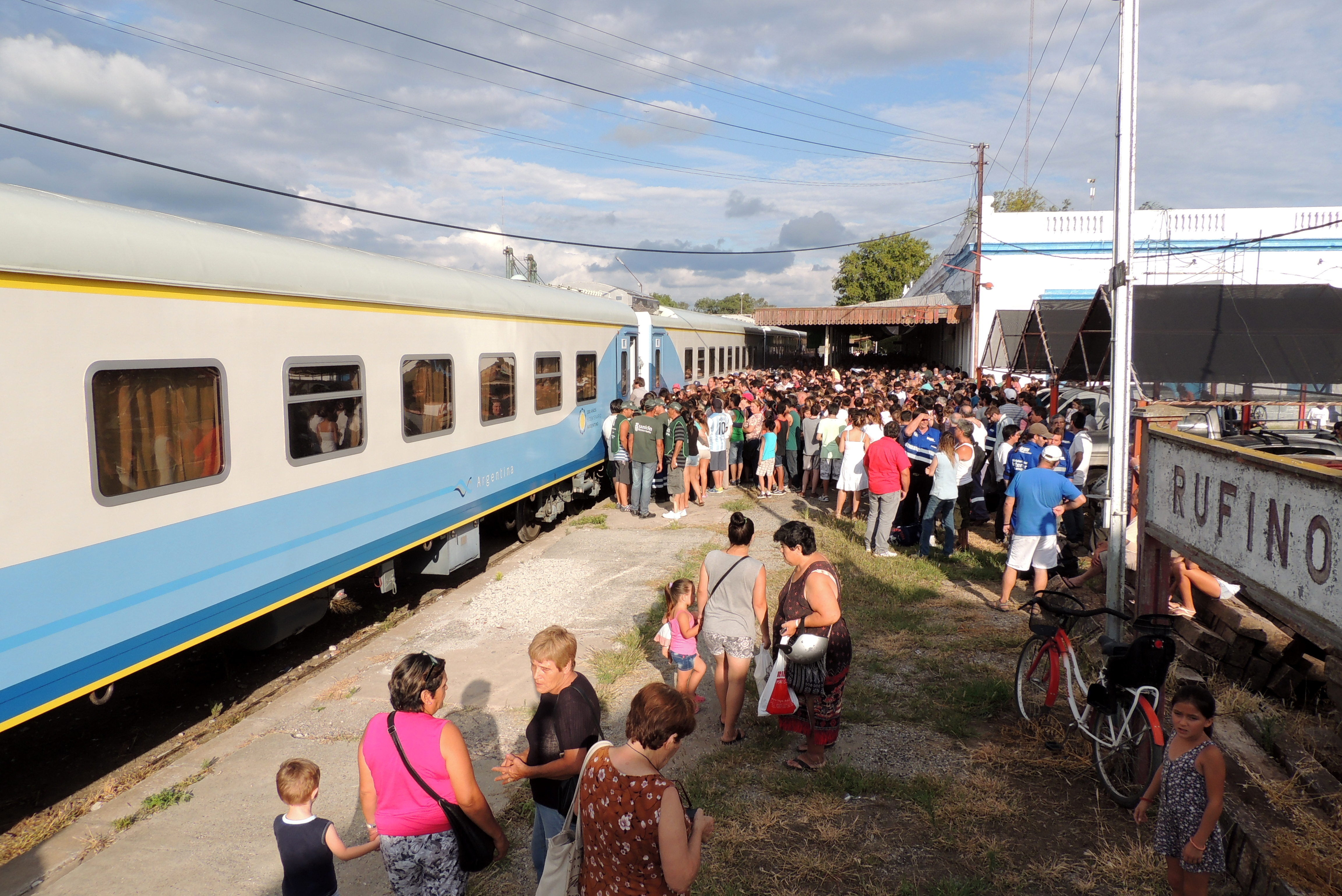 Formación cero kilómetros arribando al andén principal